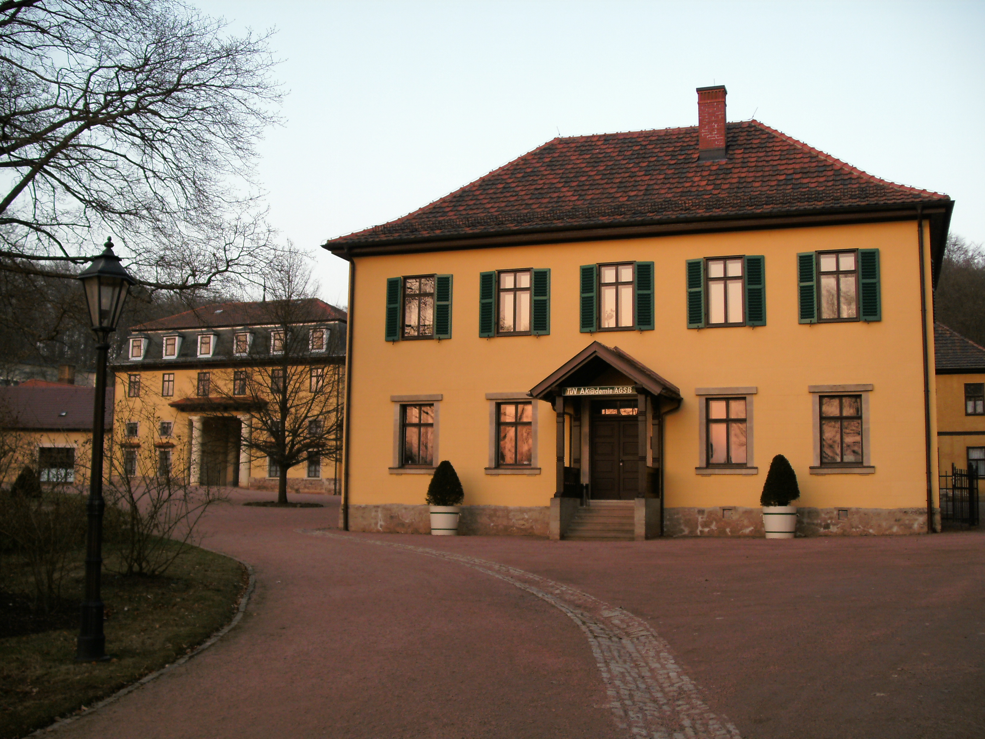 Südliches Kavaliershaus und Hofmarschallamt im Altensteiner Park